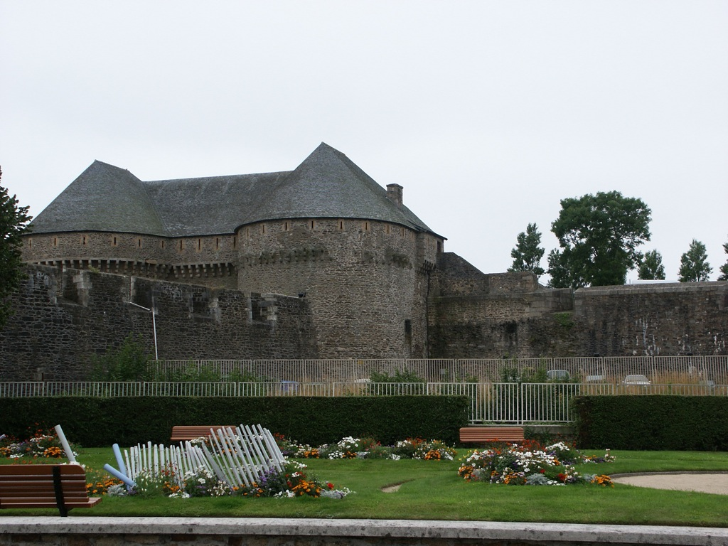 Château de Brest